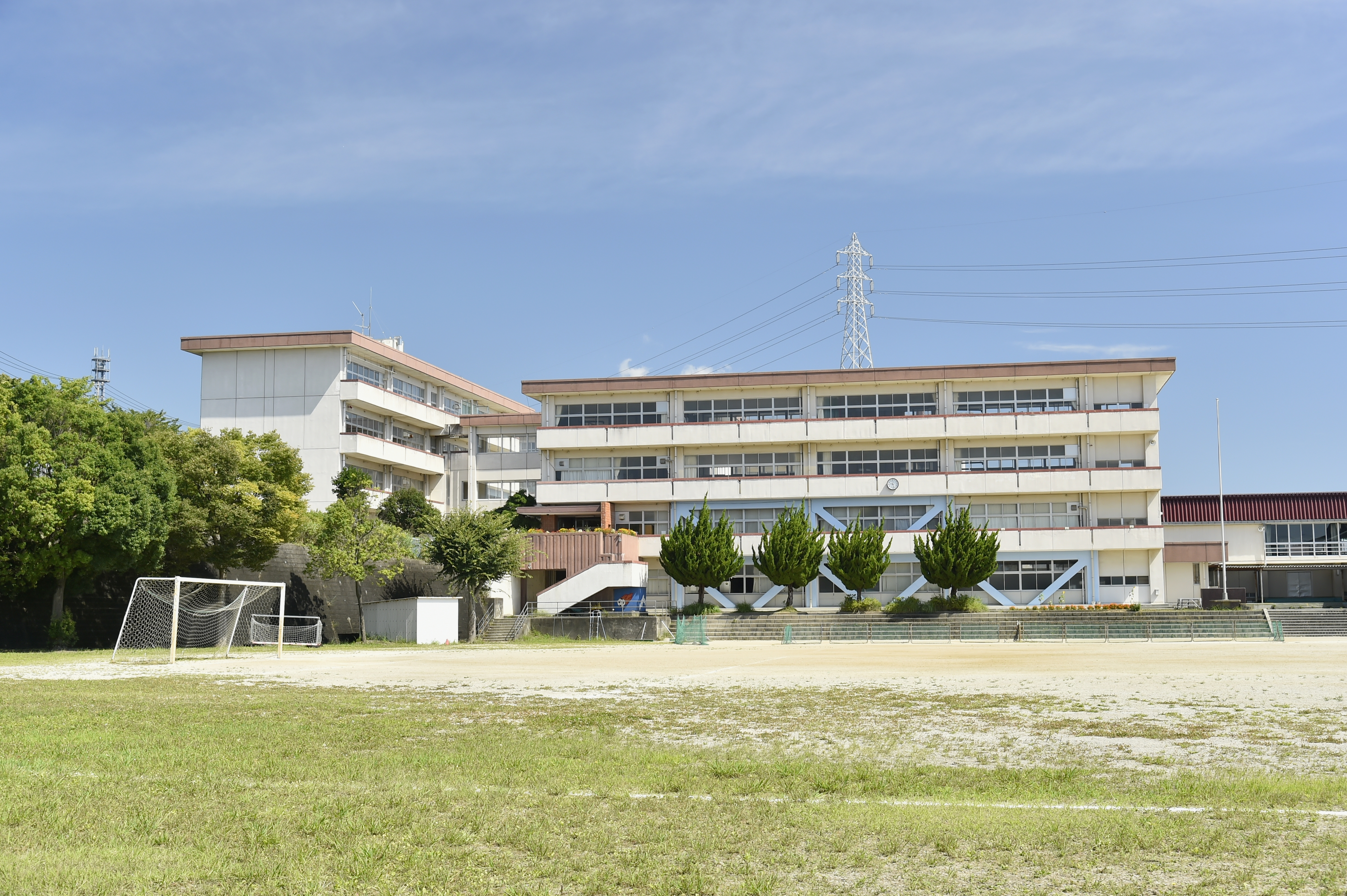 茨城県に所在する、日立市立台原中学校の校舎と校庭